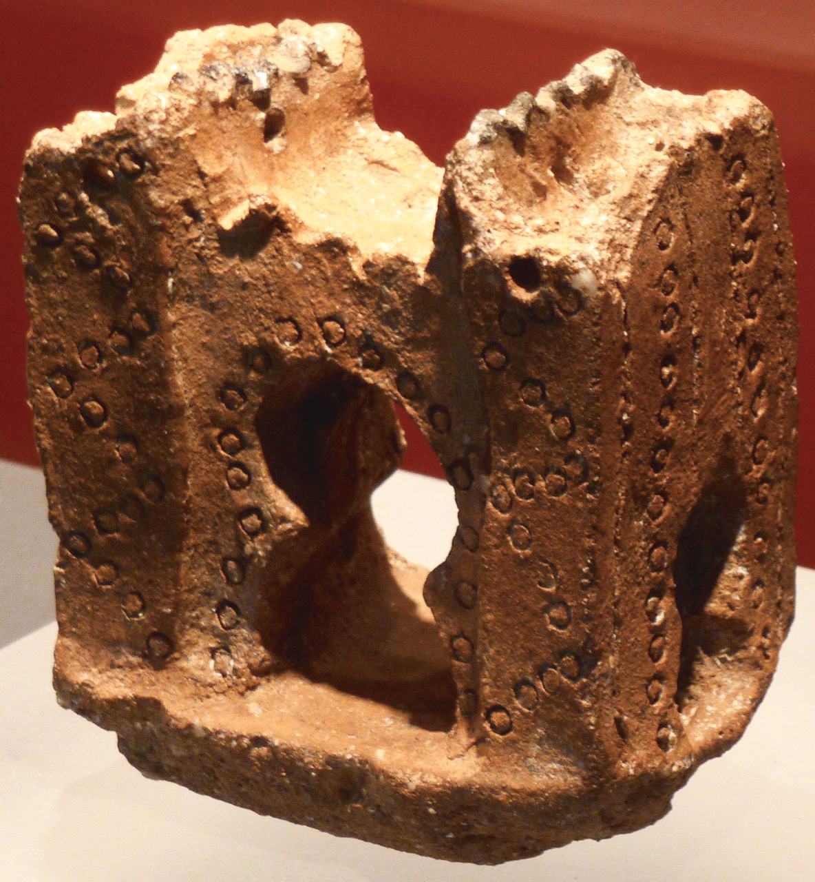 Maquette de porte de fortification islamique, Madrid, Xe siècle. Musée archéologique régional de Madrid.